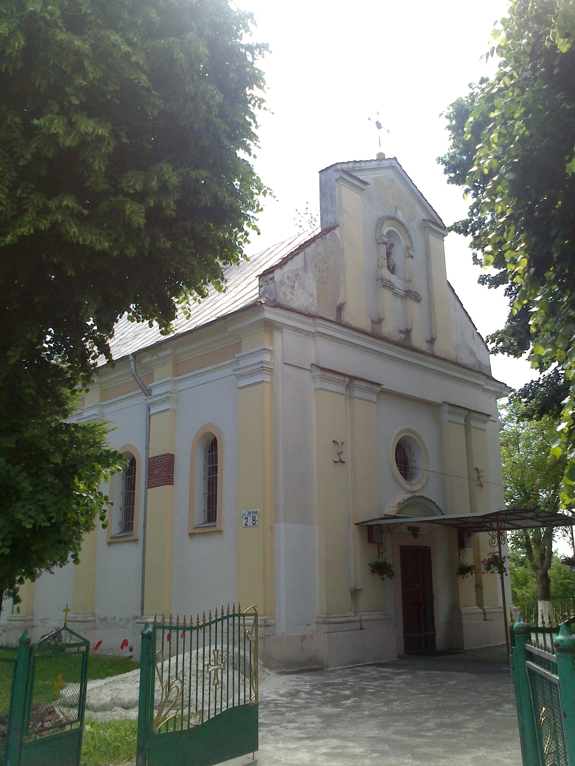 Церква Св.Димитрія на Збоїщах (передмістя Львова), вул. Загірна 28-а. Бу­ла зму­ро­ва­на в 1811-1813 роках Яном (Іваном) Ні­ко­ро­вичем на міс­ці ста­ро­го хра­му, на бу­дів­ниц­тво яко­го за­по­вів кош­ти 1603 року львівсь­кий ку­пець Кос­тян­тин Кор­някт(на старий храм).